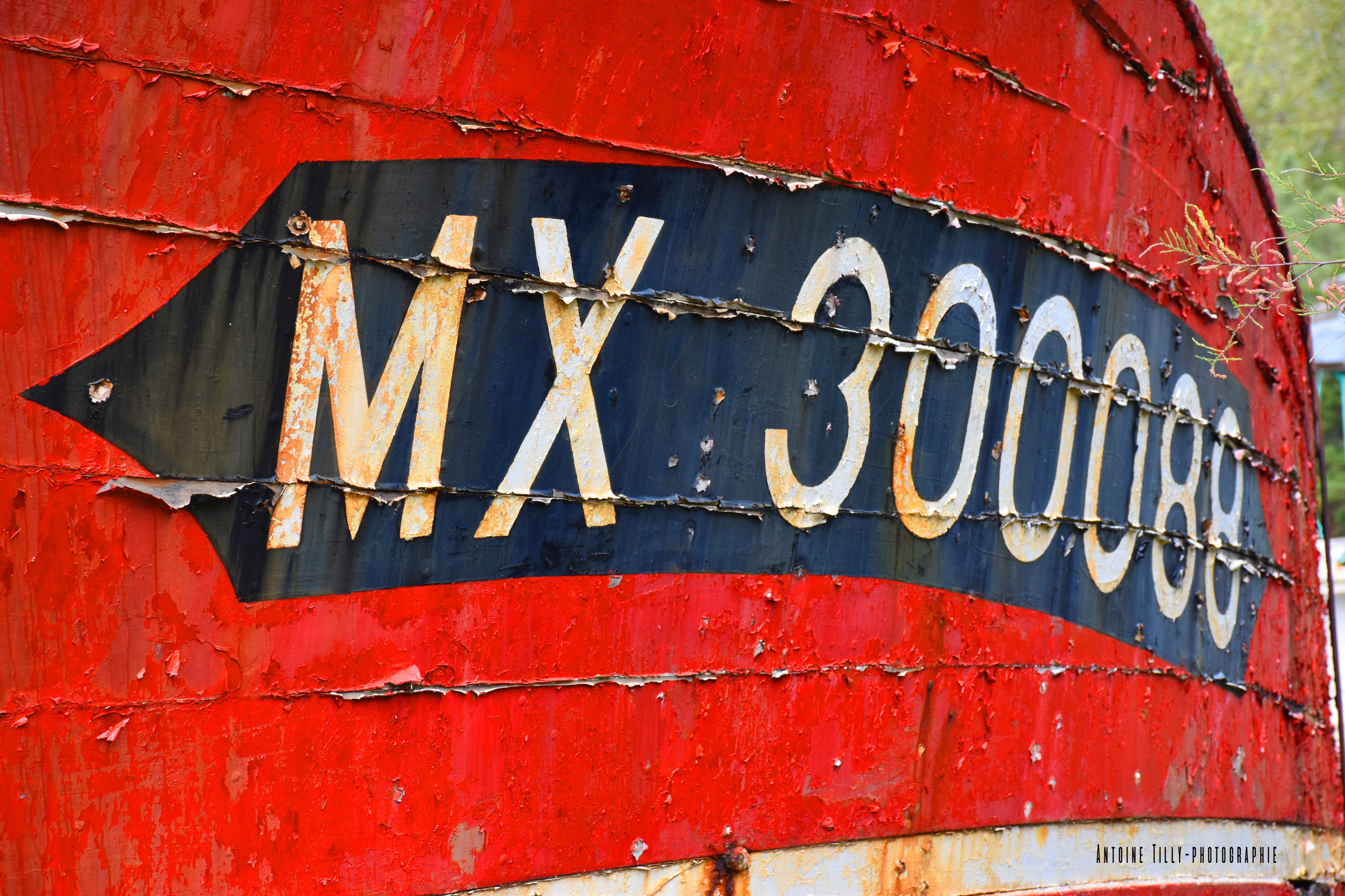 Cimetière de bateaux du Diben à Plougasnou